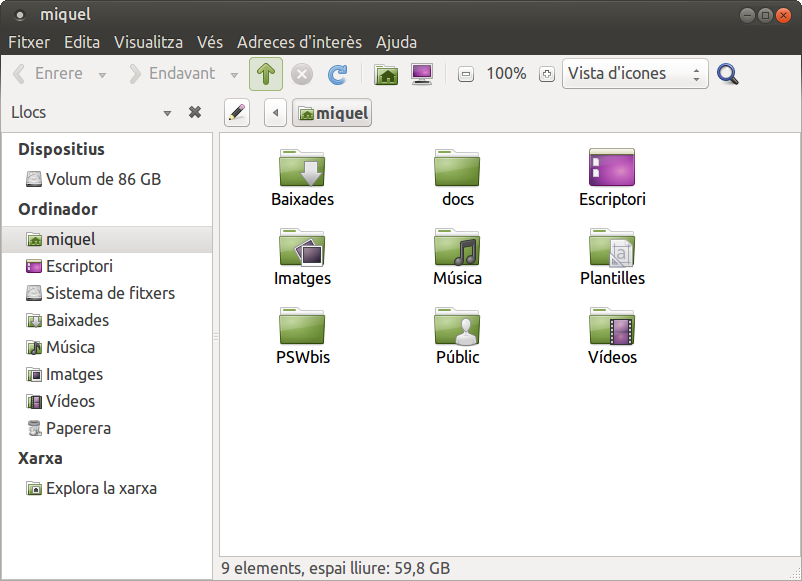 Navegador de Fitxers Caja versió 1.8.2 inclòs al s.o. Ubuntu MATE.